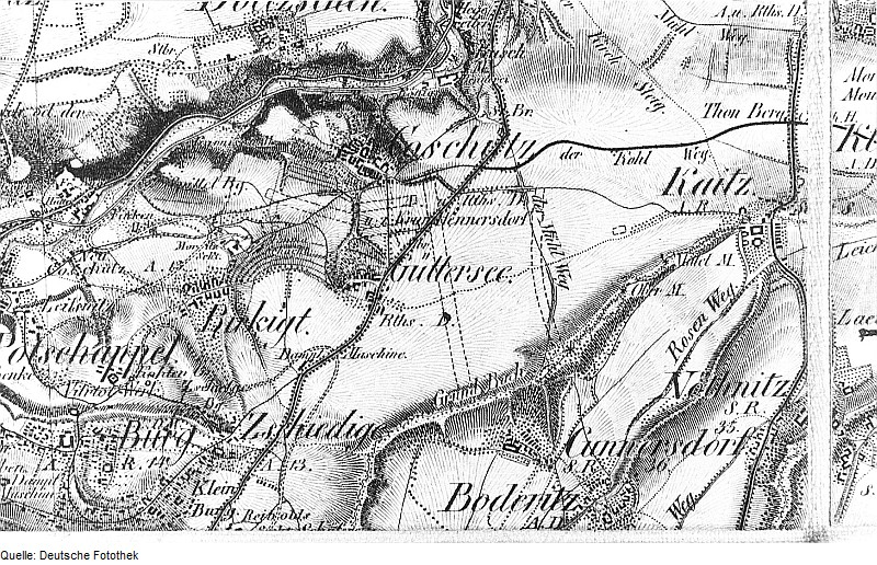 Original image description from the Deutsche Fotothek Dresden-Kaitz. Ausschnitt aus: Oberreit, Sect. Dresden, 1821/22